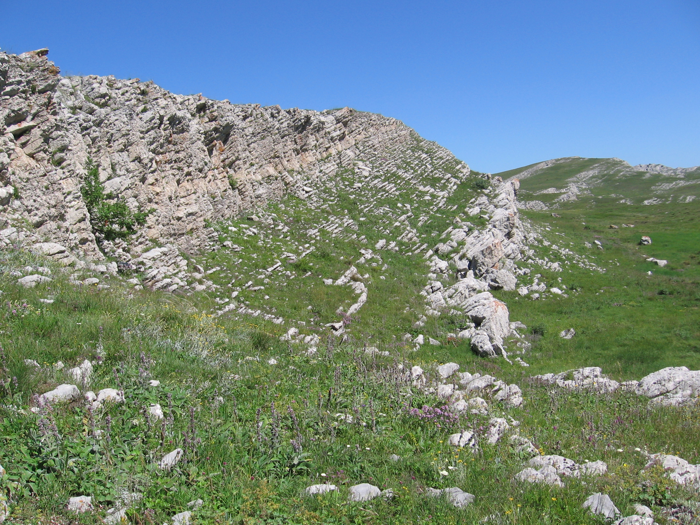 Бабуган: Фото